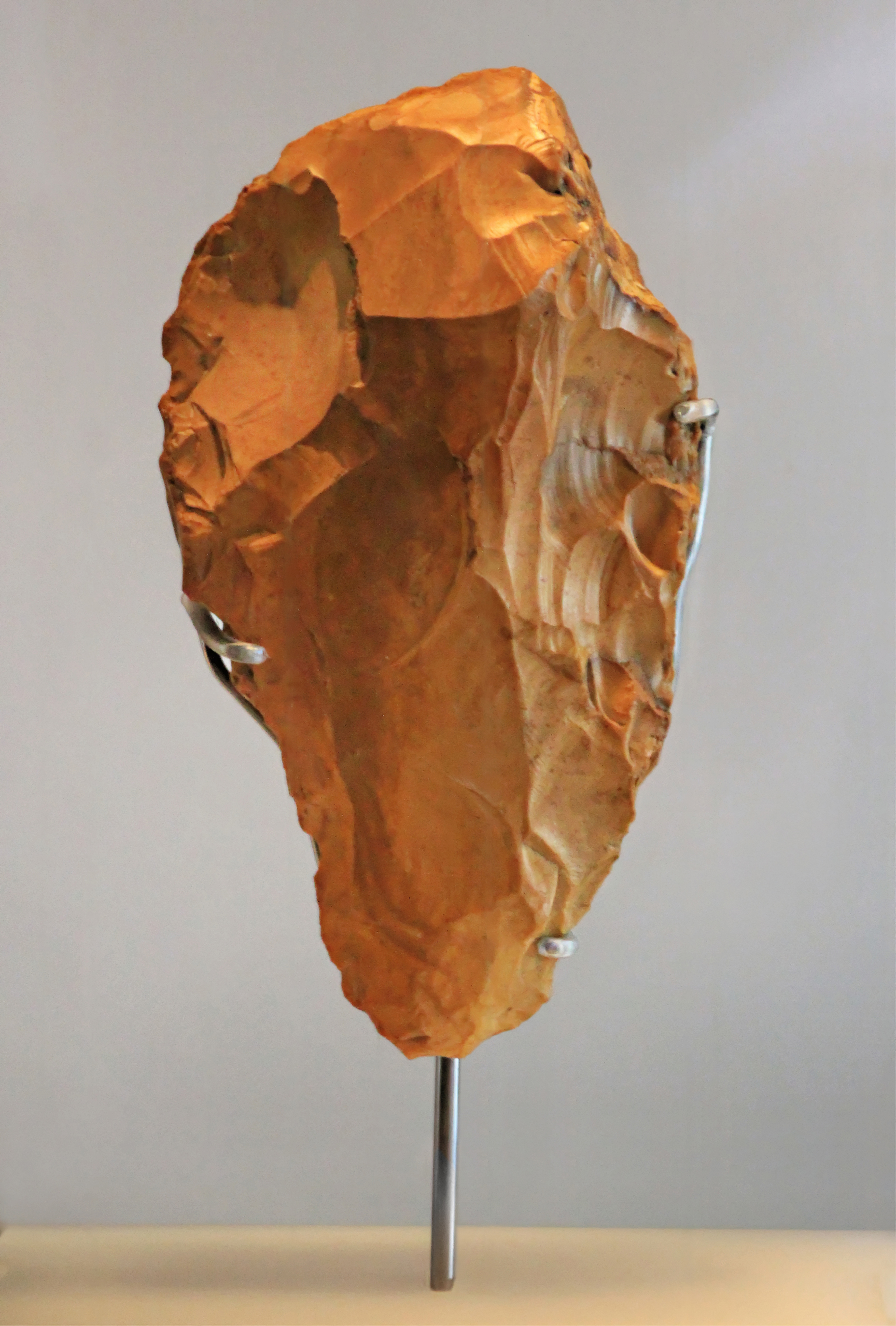 Faustkeil von Pratteln; Museum:BL, Liestal BL